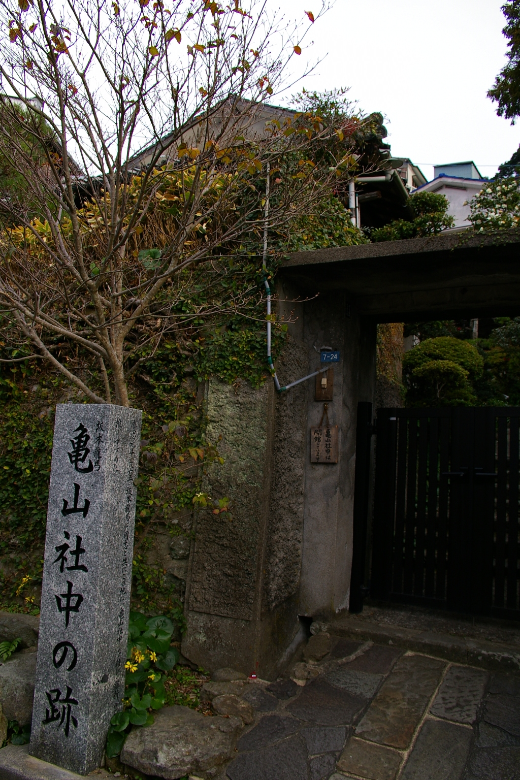 Kameyama Company